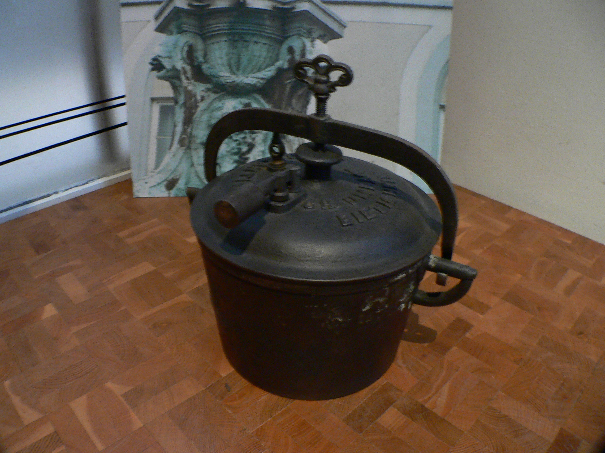 Drucktopf nach Denis Papin; Museum Ottoneum Kassel